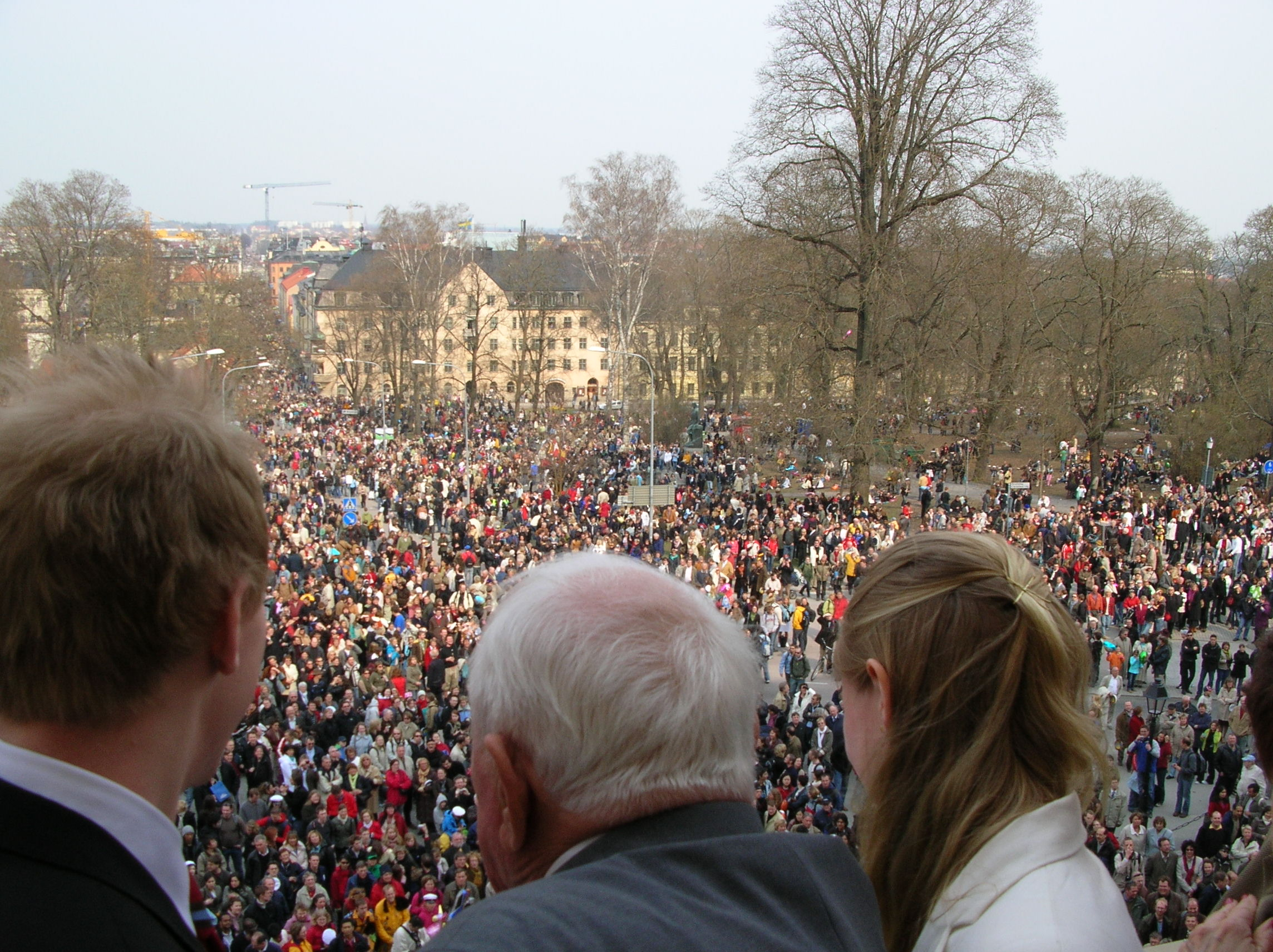 Utsikt från Carolina Redivivas balkong, strax före mösspåtagningen under Valborgsfirandet